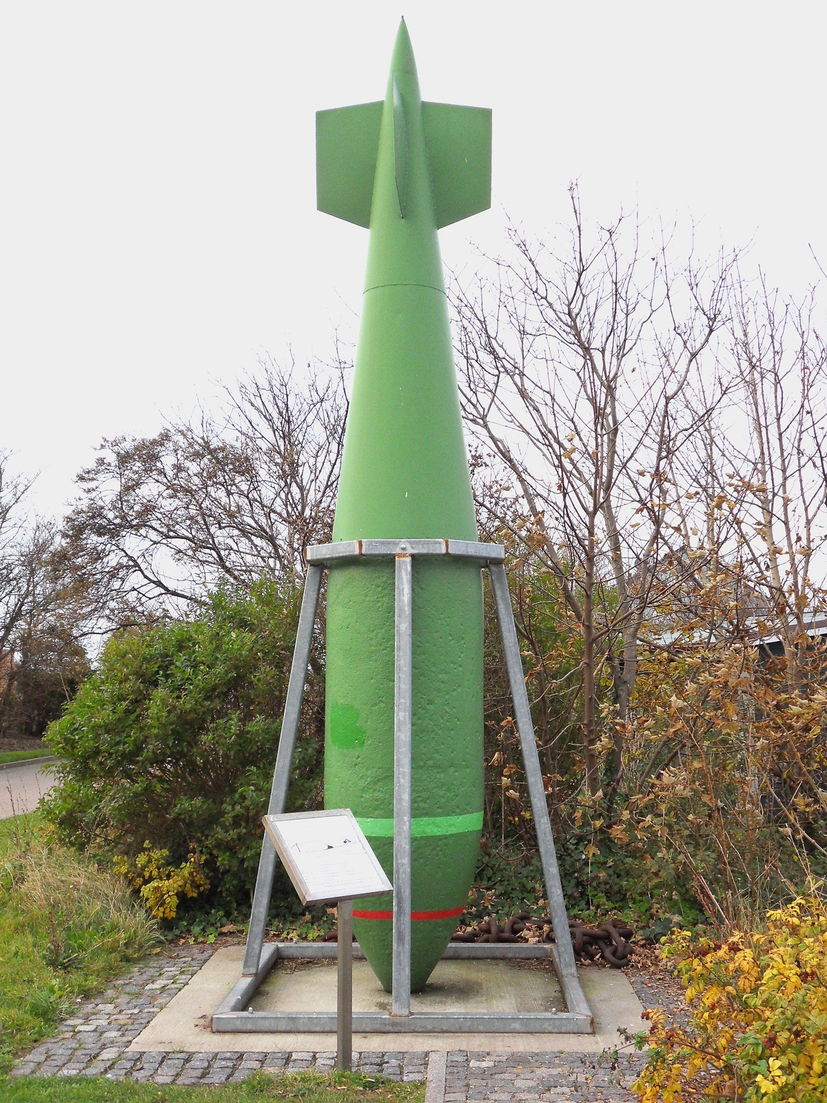 Ausgestellte Tallboy-Bombe auf Helgoland